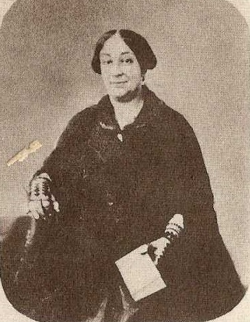 Mercedes Marín del Solar (1804-1866), primera poetisa e intelectual chilena, hija del integrante de la Primera Junta Nacional de Gobierno de Chile Gaspar Marín, de gran popularidad en su tiempo dedicó sus últimas años a la beneficiencia, la acción política y la educación de la mujer.